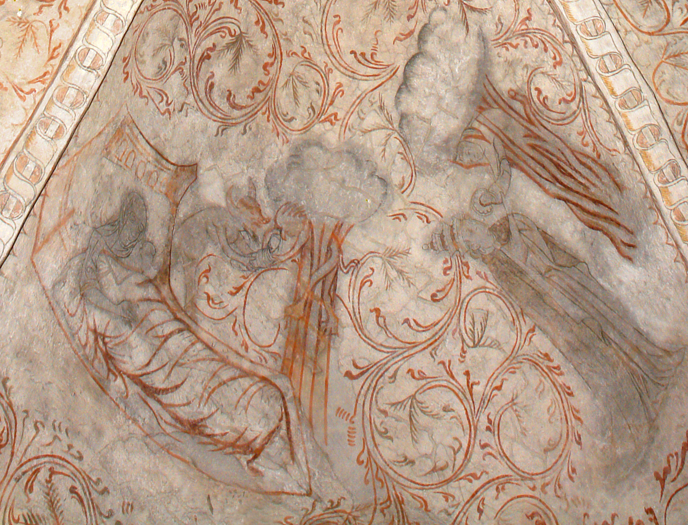 Kirche von Undløse, Dänemark (West-Seeland). Wandmalereien aus der Zeit um 1430–50 vom „Unionsmeister“ oder „Undløse-Meister“ genannten „Meister von Fogdö“. Motiv in dieser Kappe: Laurentius Geburt und Kindheit nach der Legende (Teufel tauscht Baby gegen Wechselbalg).